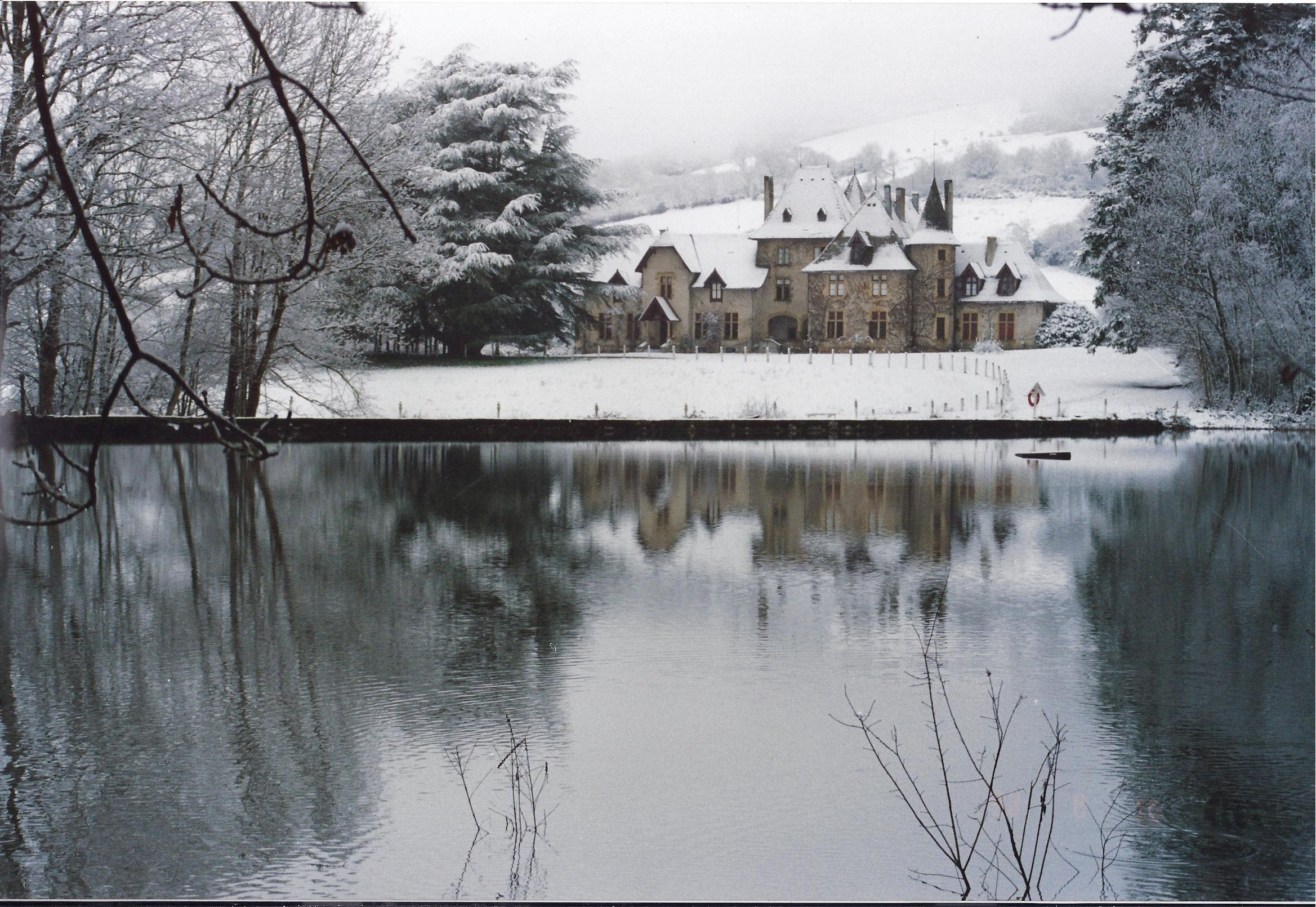 Château de Pierrefitte